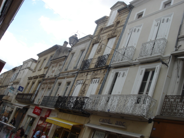 Alignement de maisons d'époques différentes à Villeneuve-sur-Lot